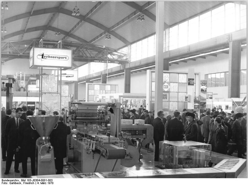 Leipzig, Frühjahrsmesse, Verpackungsmaschine Zentralbild Gahlbeck 4-3-70 Leipziger Frühjahrsmesse 1970- In der Halle 4 zeigt die CSSR Außenhandelsgesellschaft Technoexport unter anderem eine Verpackungsmaschine.